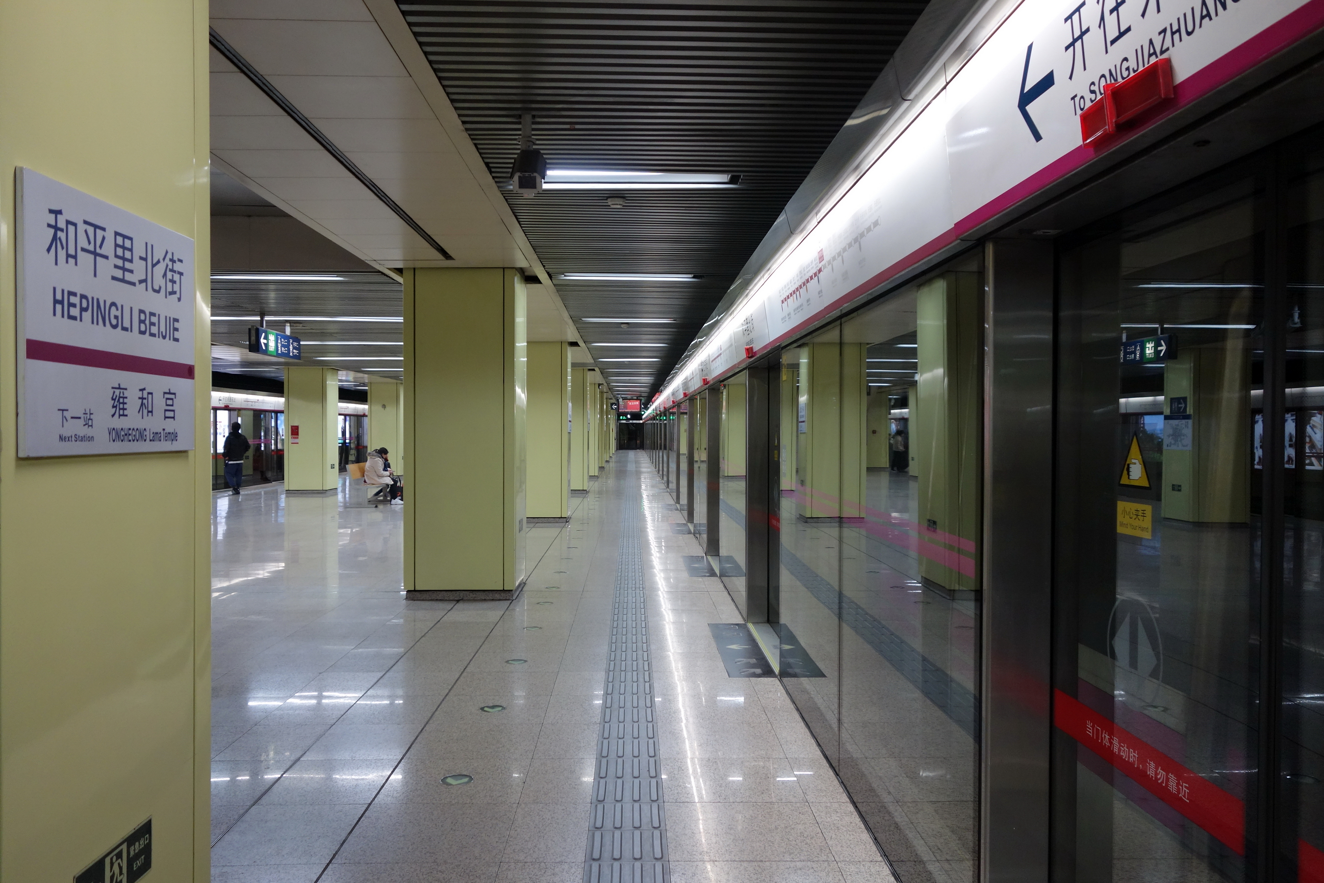 北京地铁5号线和平里北街站站台